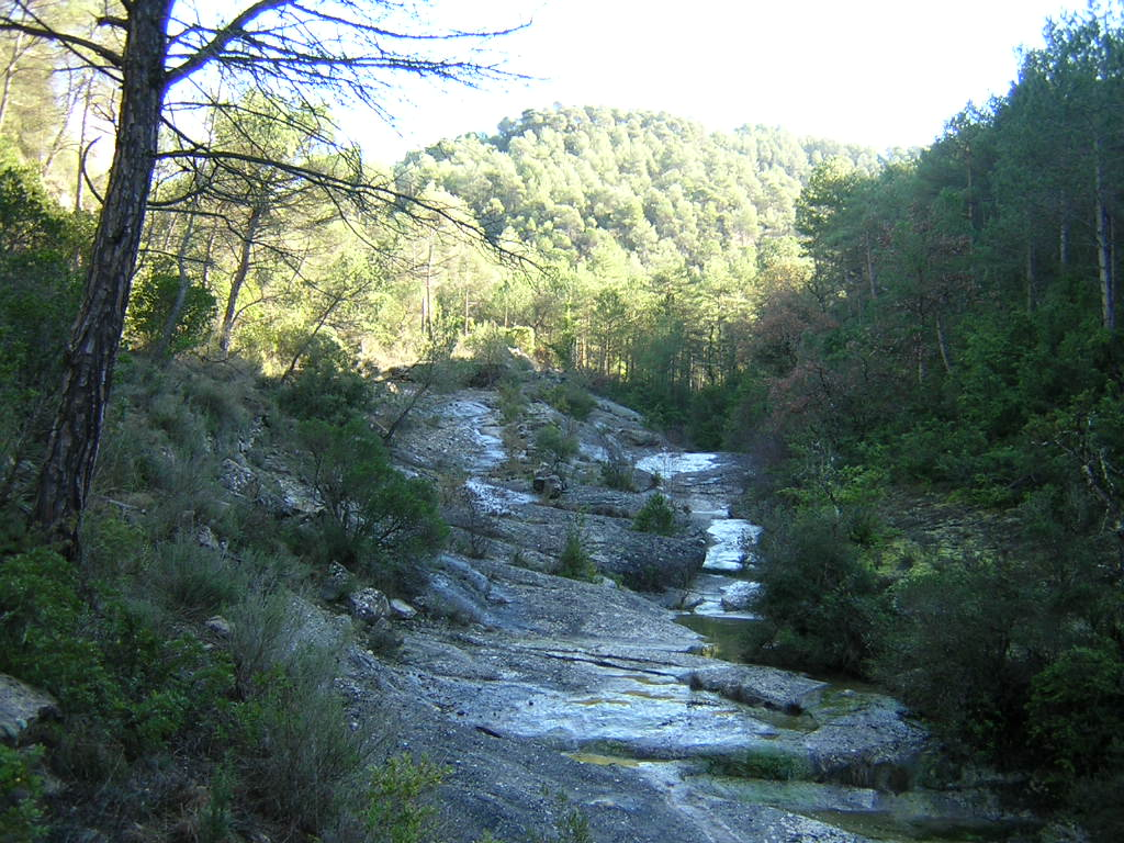 Llera del torrent de Mussarra (Calders i Monistrol de Calders, Moianès)